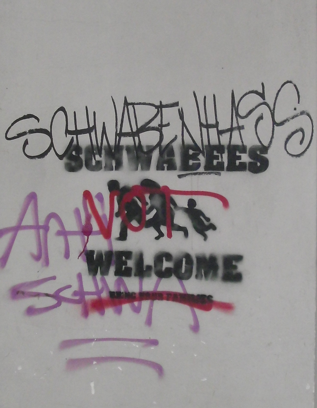 Graffito in der Prenzlauer Allee 53 auf der Hauswand der Bäckerei Sporys, die als "Schwäbische Bäckerei" beworben wird. Der erste Schriftzug war "Anti Schwa" in Abwandlung von "Antifa". Das von "Refugess Welcome - Bring your families" abgewandelte Motiv "Schwabees Welcome", das sich gegen die Schwabenfeindlichkeit richtete, wurde wiederum durch ein "not" übermalt. Oben steht das Wort "Schwabenhass". Vgl.